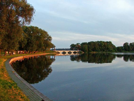 Widok na most na jeziorze Ełckim.